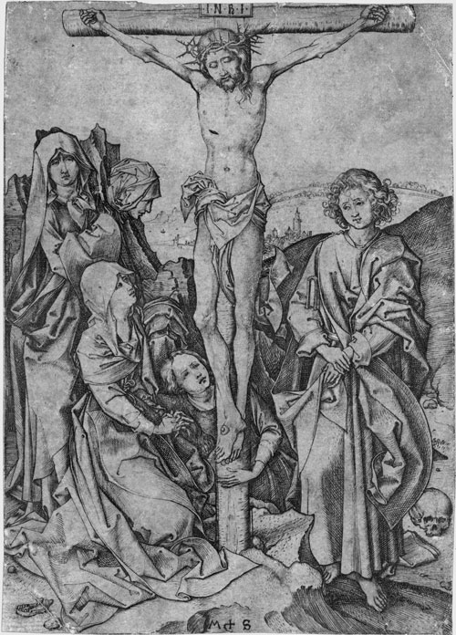 assenge auction house, 2006, lot 6383 Christus am Kreuz. Kupferstich. B. 17, TIB (Commentary) .027, Lehrs 27. Ausgezeichneter, gleichmäßiger Druck. Auf die Darstellung geschnitten, partiell minimal knapp innerhalb dieser. Die unteren sowie die rechte obere Ecke angesetzt und ergänzt, verschiedene Alters- und Gebrauchsspuren, gleichwohl noch guter Gesamteindruck.